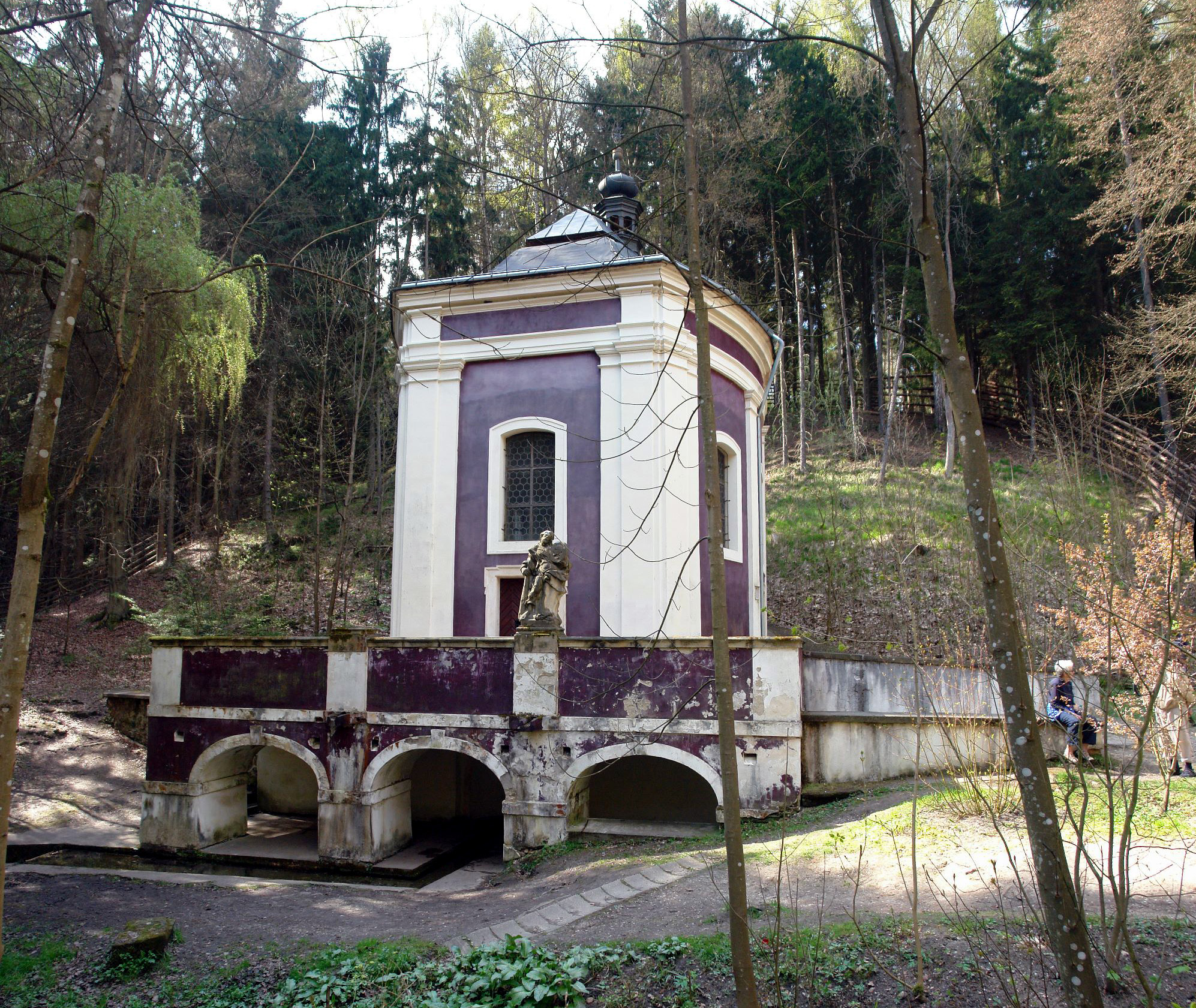 Kaple svatého Štěpána (Stapina), Klokočka, Velký Rečkov.